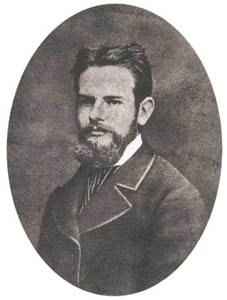 Young Leopoldo Alas y Ureña aka Clarin